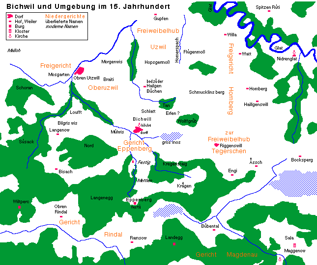 s Gricht Eppenberg bzw. d Herrschaft Eppeberg und Umgebig im Mittelalter. Gwässer noch alte Charte, Waldbistand vo hüt. Charte noch mittelalaterlich Urchunde aagfertig vo al-Qamar, Wikipeida